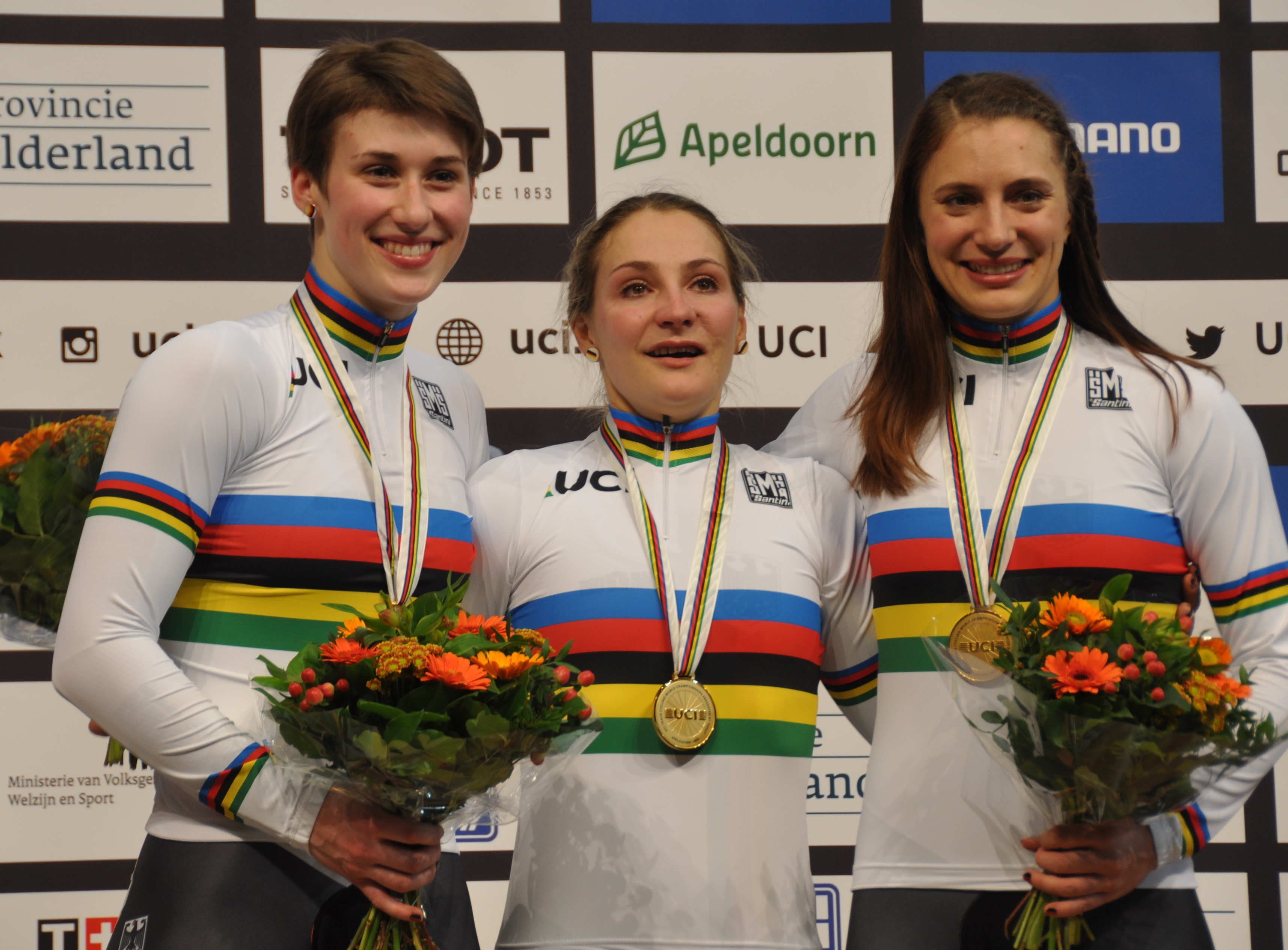 Weltmeisterinnen im Teamsprint (v.l.n.r.): Pauline Grabosch, Kristina Vogel, Miriam Welte